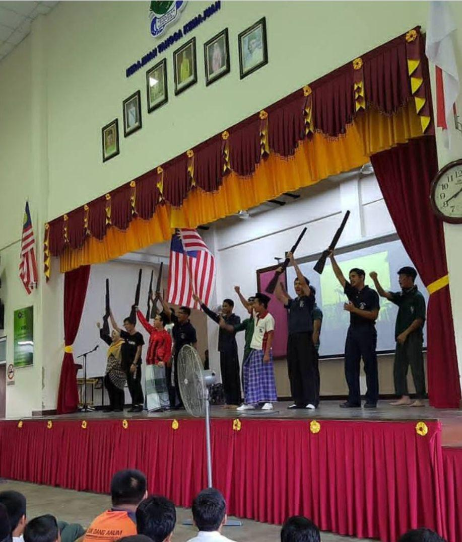 Persembahan pelajar yang sangat menarik sempena Hari Kemerdekaan